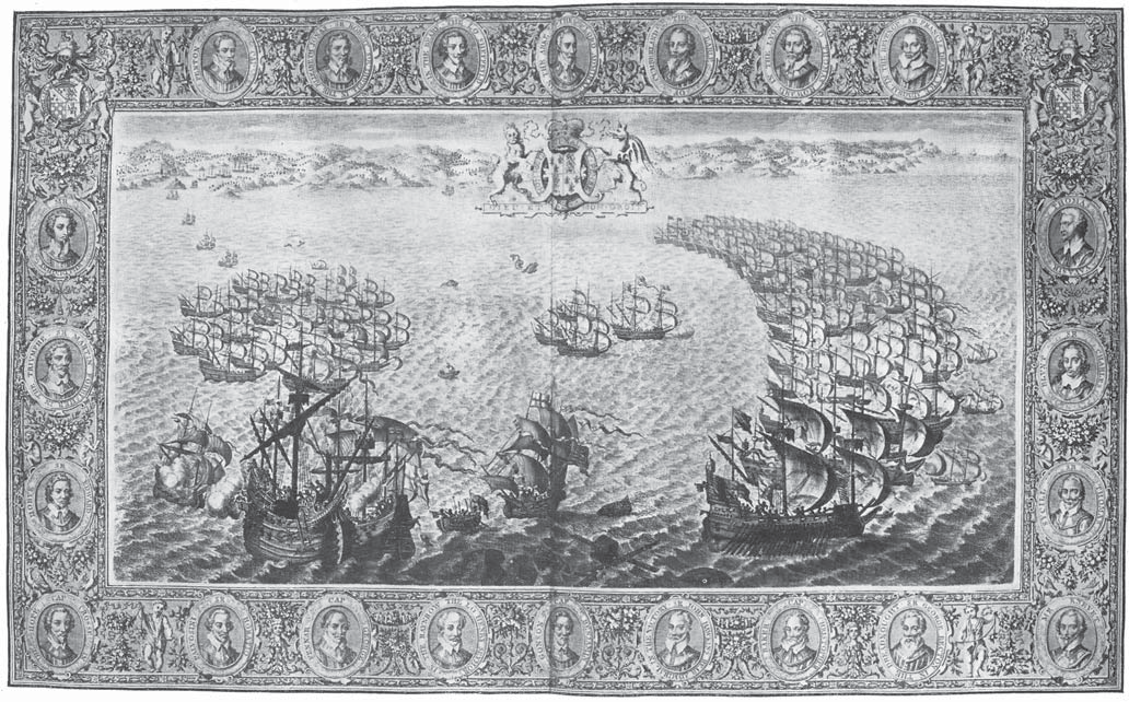 Vallesen galeoia Drakek suturik. Anglais : An 18th-century print showing a straggle of English ships (left) up against the might of the Spanish Armada (right), the coat of arms of Queen Elizabeth hovering above. The full print features an ornamental border decorated with portraits of 22 commanders from the English flee.